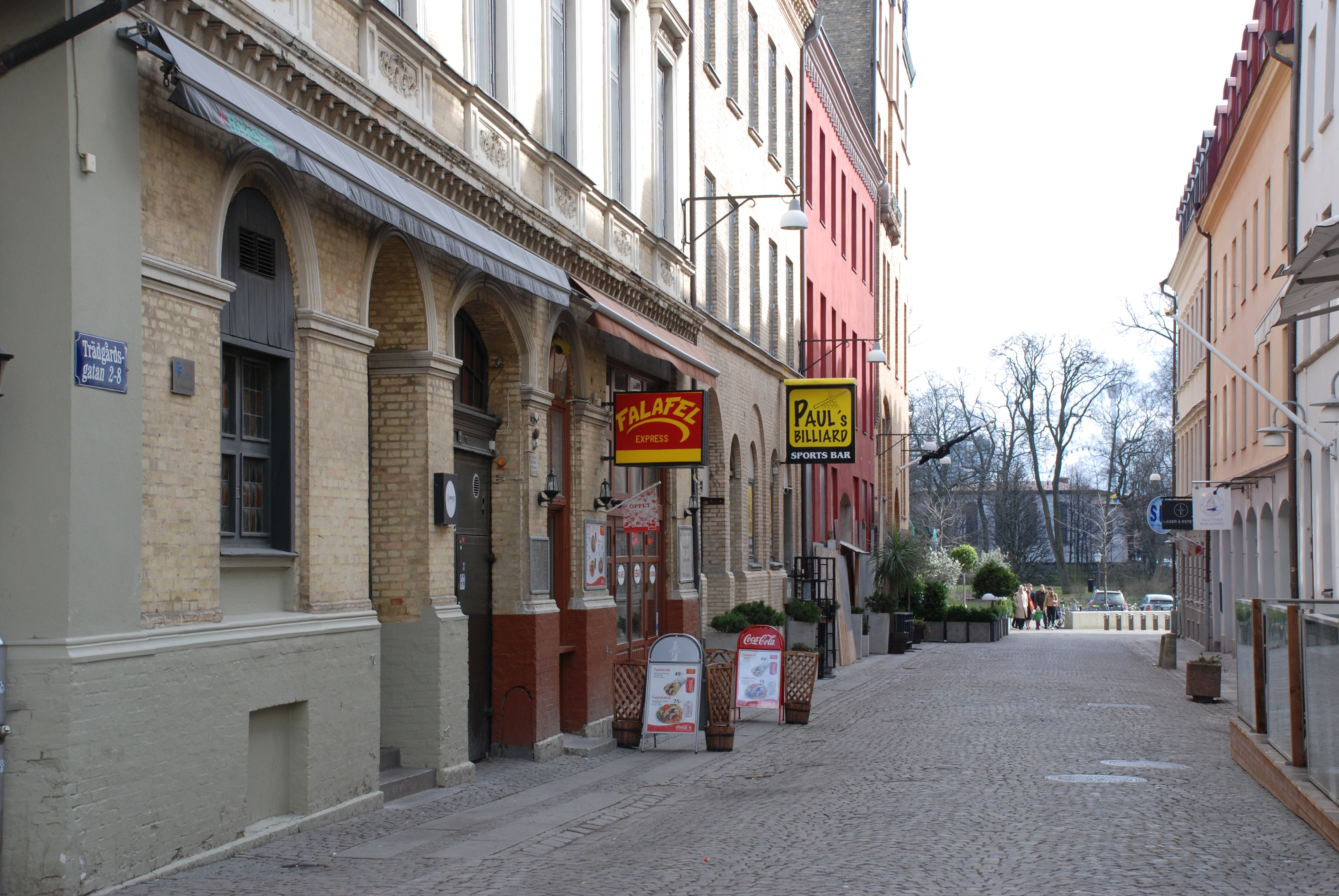 Trädgårdsgatan i stadsdelen Inom Vallgraven i Göteborg.